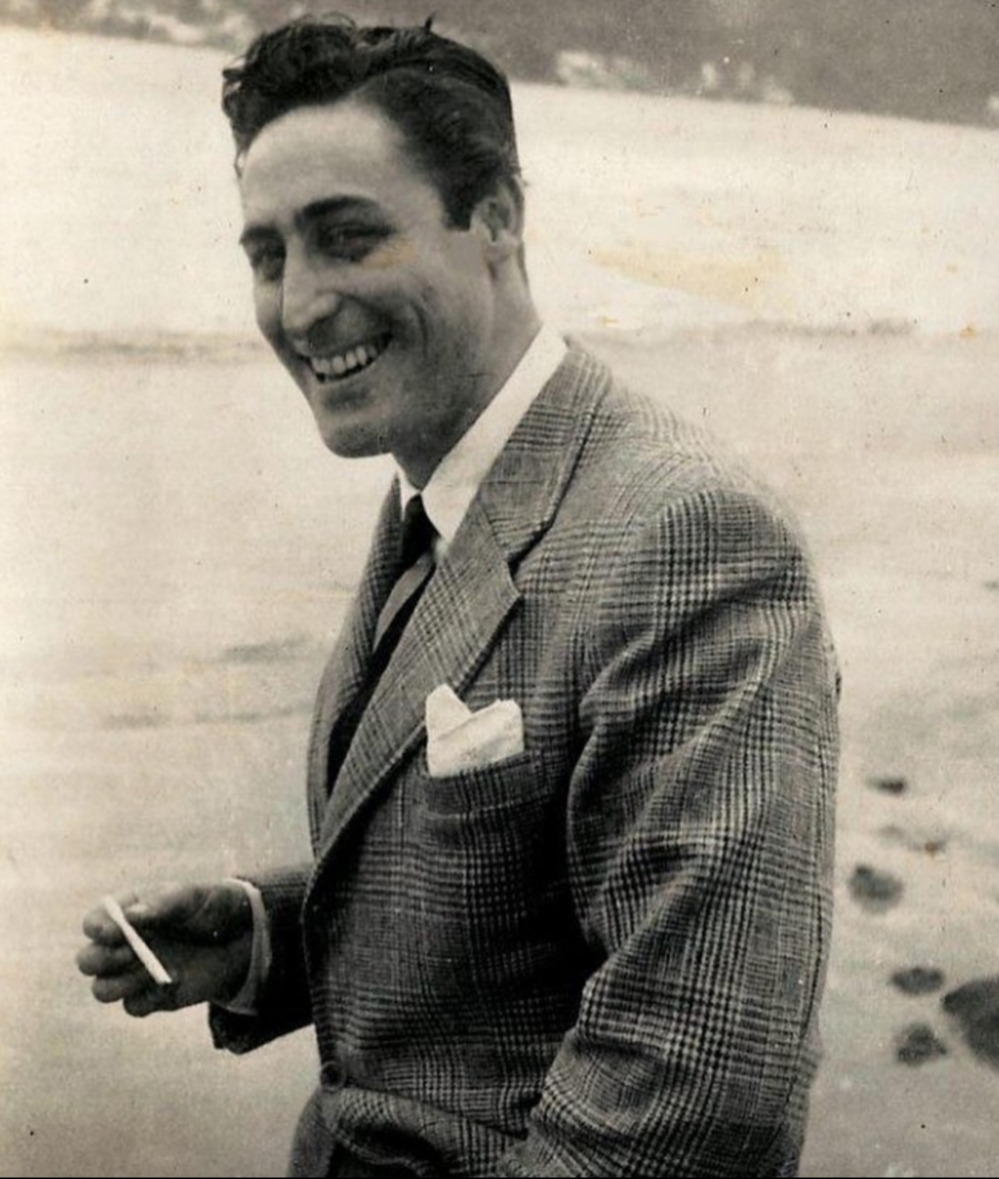 O artista Italo Cencini aparece ao sorrindo de cabelos negros penteados. Tem um cigarro na mão direita e sorri para a camera. Veste um terno "príncipe de gales" e gravata. Ao fundo o mar em uma praia.